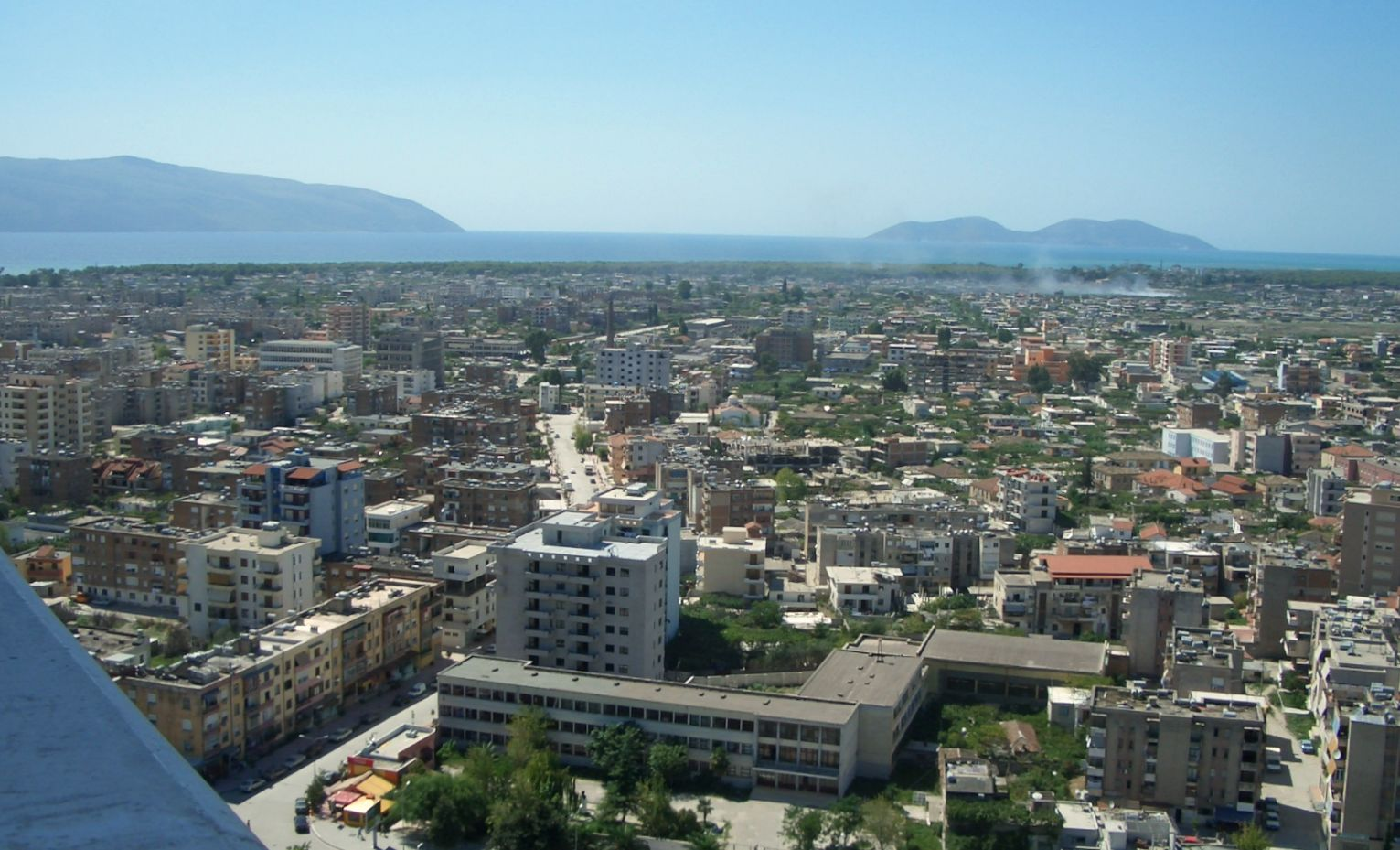 Ansicht von Vlora in Albanien, im Hintergrund die Insel Sazan